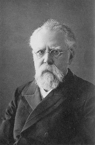 Зернов, Дмитрий Николаевич